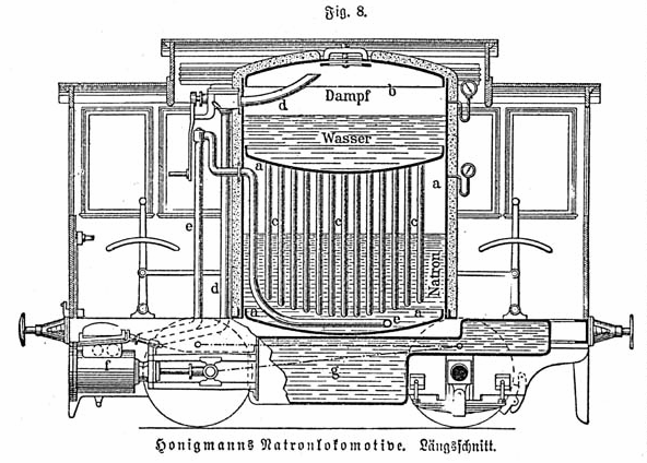 Honigmanns Natronlokomotive, Längsschnitt